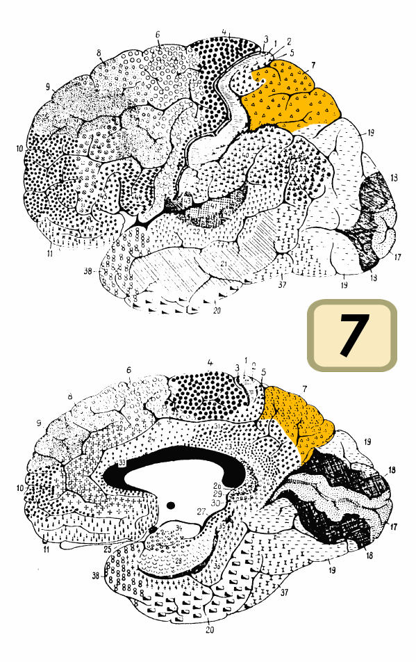 Brodmann area 7.